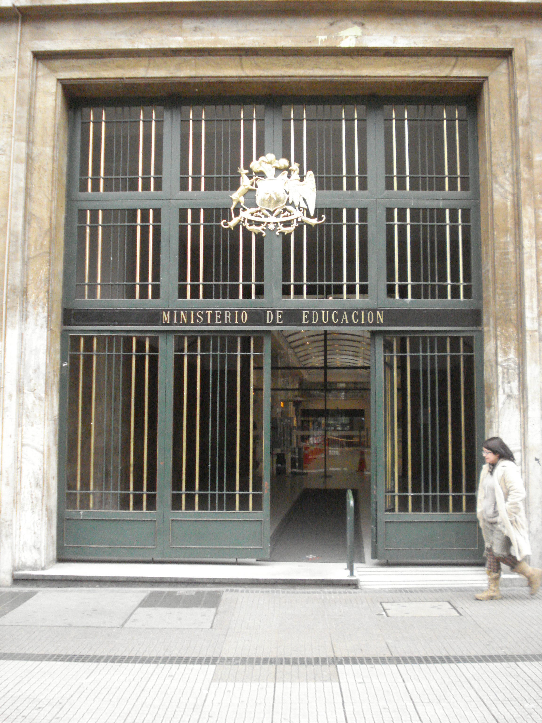 Entrada del Edificio del Ministerio de Educación de Chile en Av. Libertador Bernardo O'Higgins N° 1371, Santiago de Chile